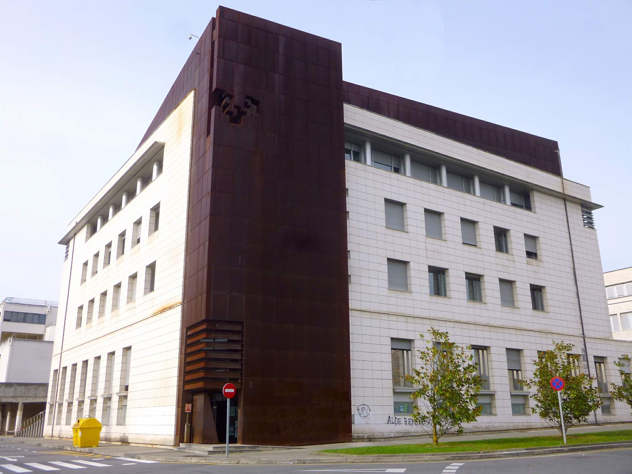 Lejona - Campus de Bizkaia de la UPV-EHU - Escuela Universitaria de Relaciones Laborales